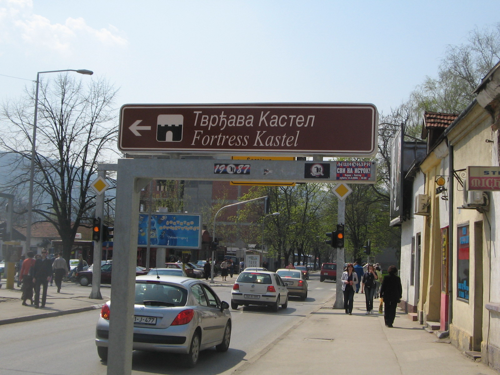 Putokaz_za_Kastel